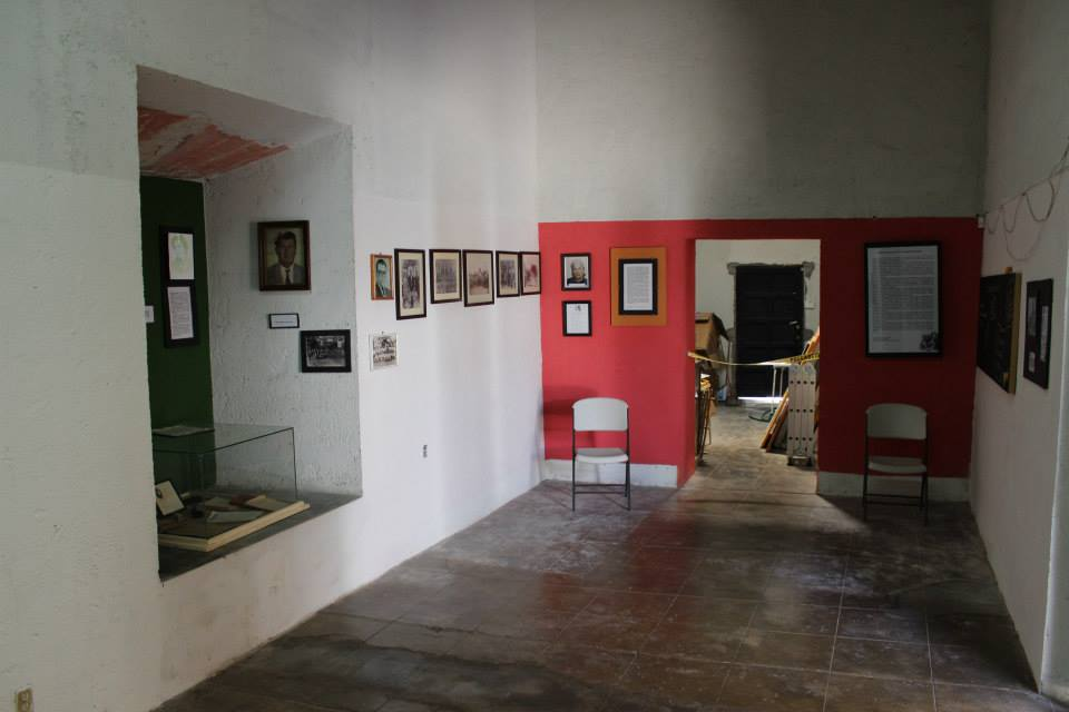 Carteles y fotografías de la epoca